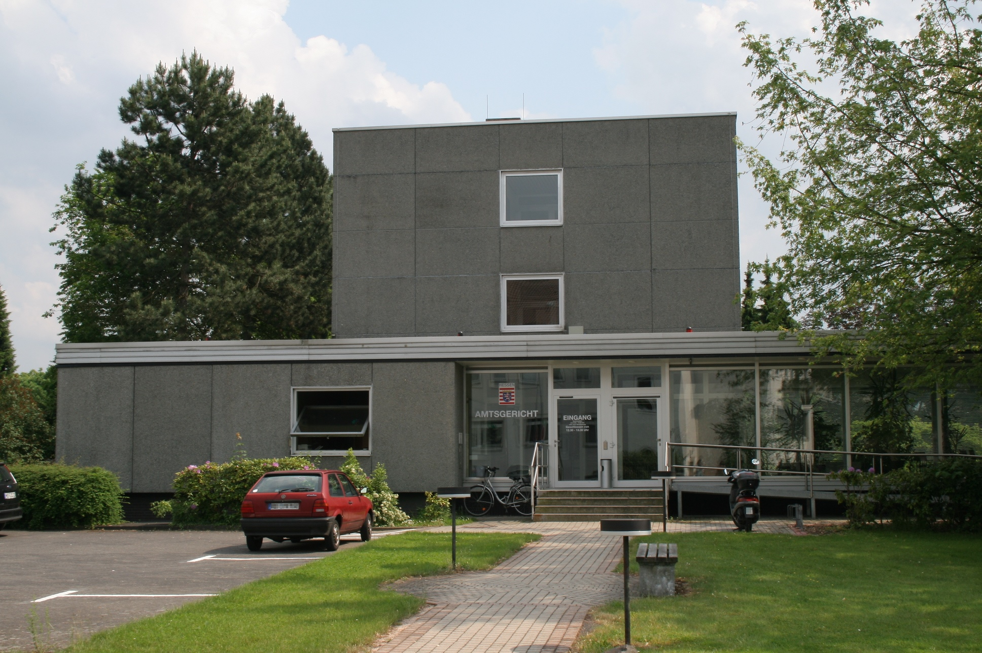 Ehemaliges Amtsgericht in Rotenburg an der Fulda.